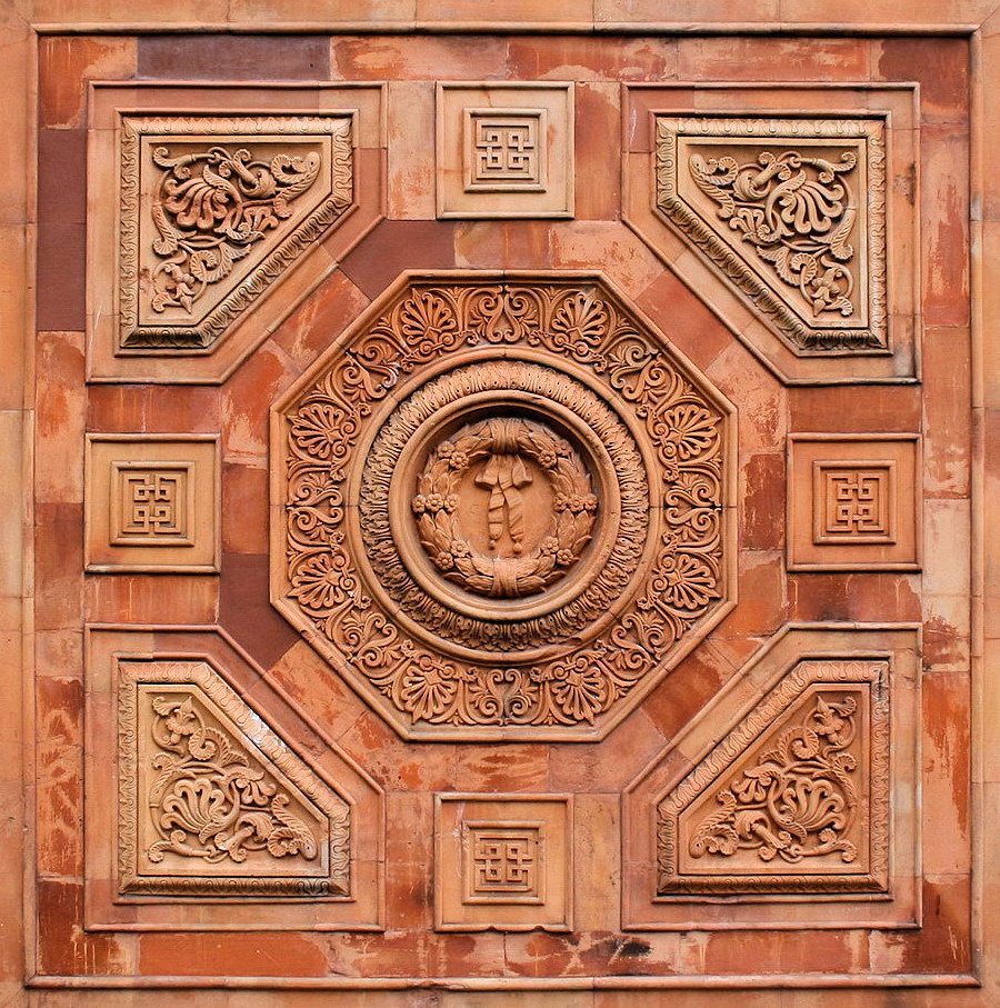 Aussenmauer der Wilhelma Stuttgart